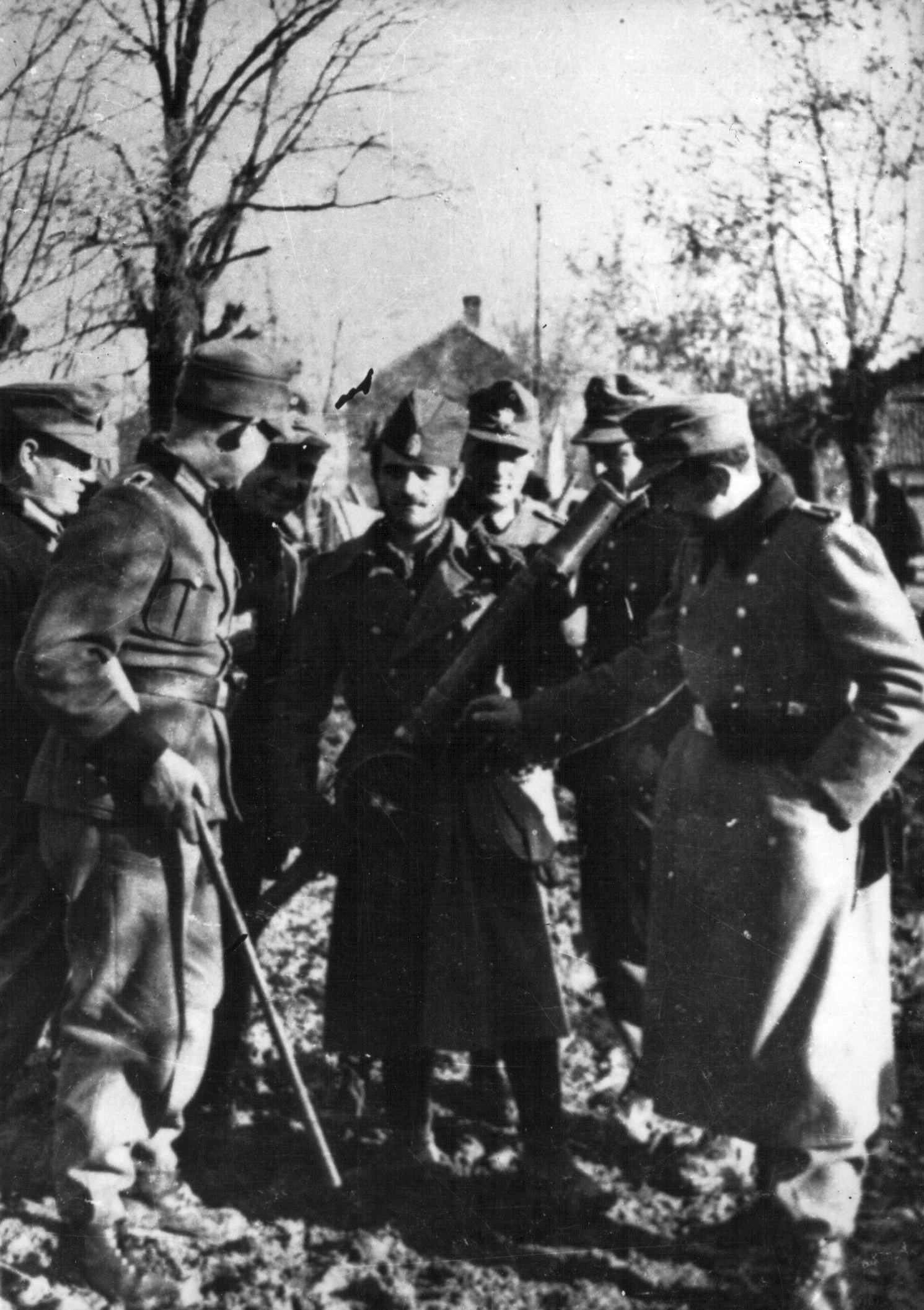 Srpskohrvatski / српскохрватски: Nemci predaju minobacač četnicima.